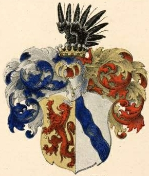 Tolli suguvõsa aadli- ja parunivapp